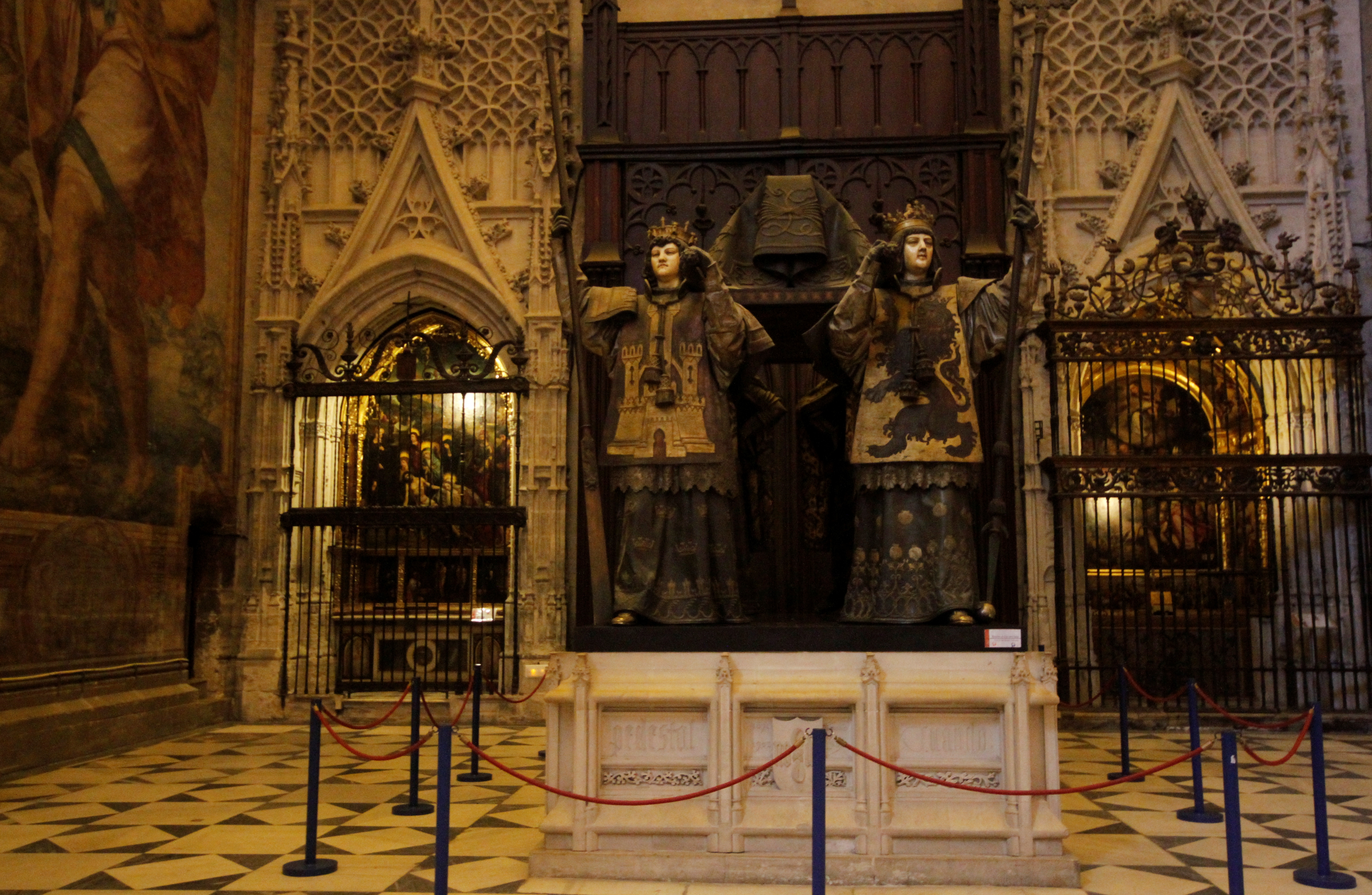 El sepulcro de Cristóbal Colón, en el brazo sur del crucero de la catedral de Sevilla, (España). A la izquierda del sepulcro puede verse el gran fresco de San Cristóbal y el altar de la Piedad, y a la derecha del mismo el altar de la Concepción.